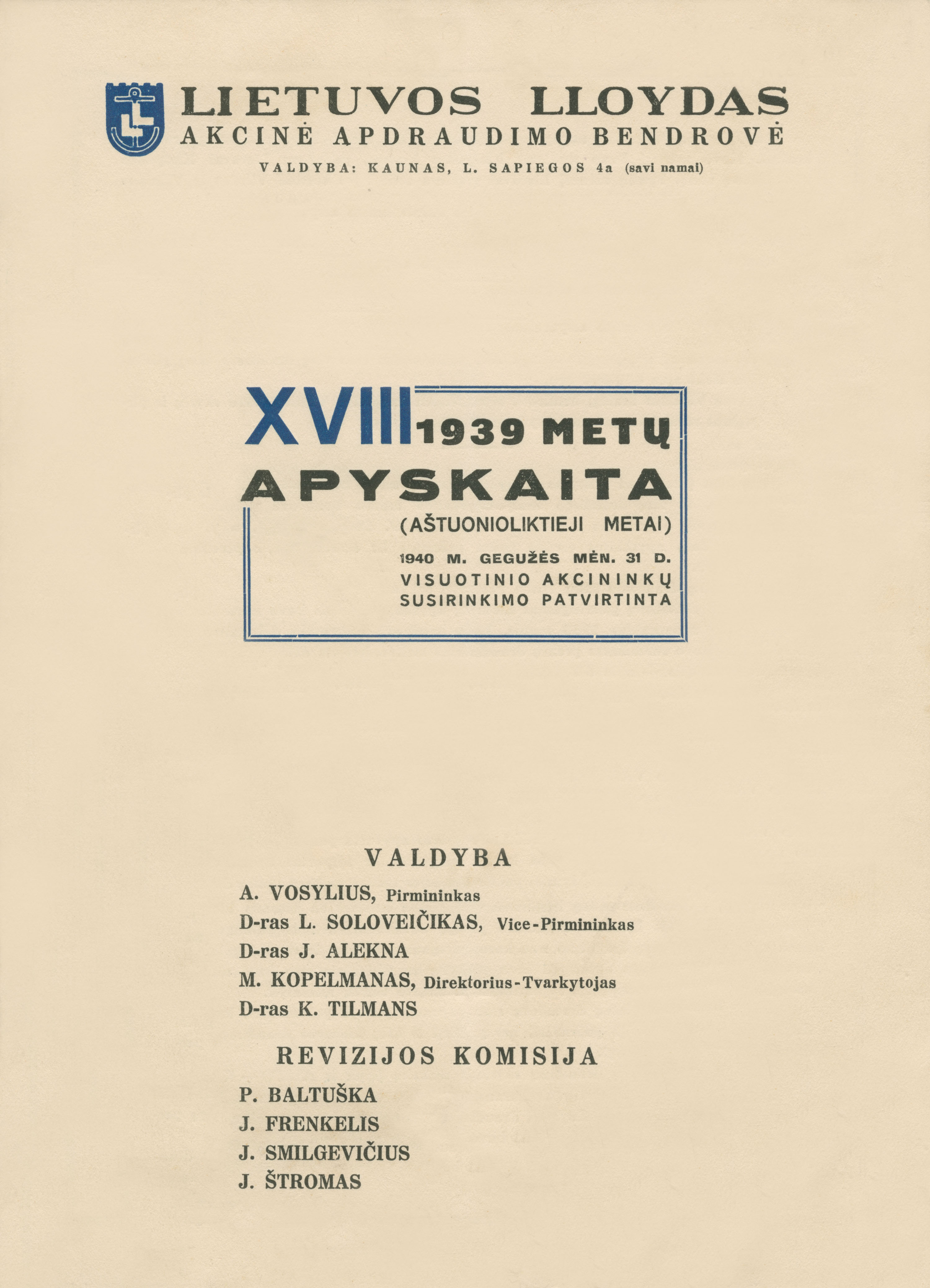 Lietuvos Lloydas. Akcinė apdraudimo bendrovė. 1939 metų apyskaita (aštuonioliktieji metai).